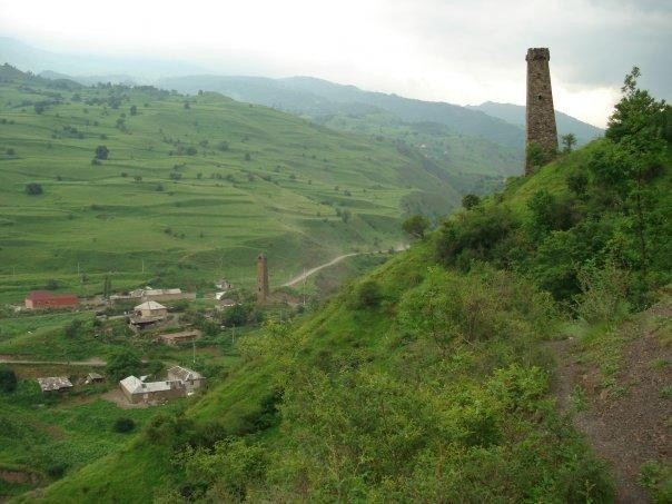 Дёре